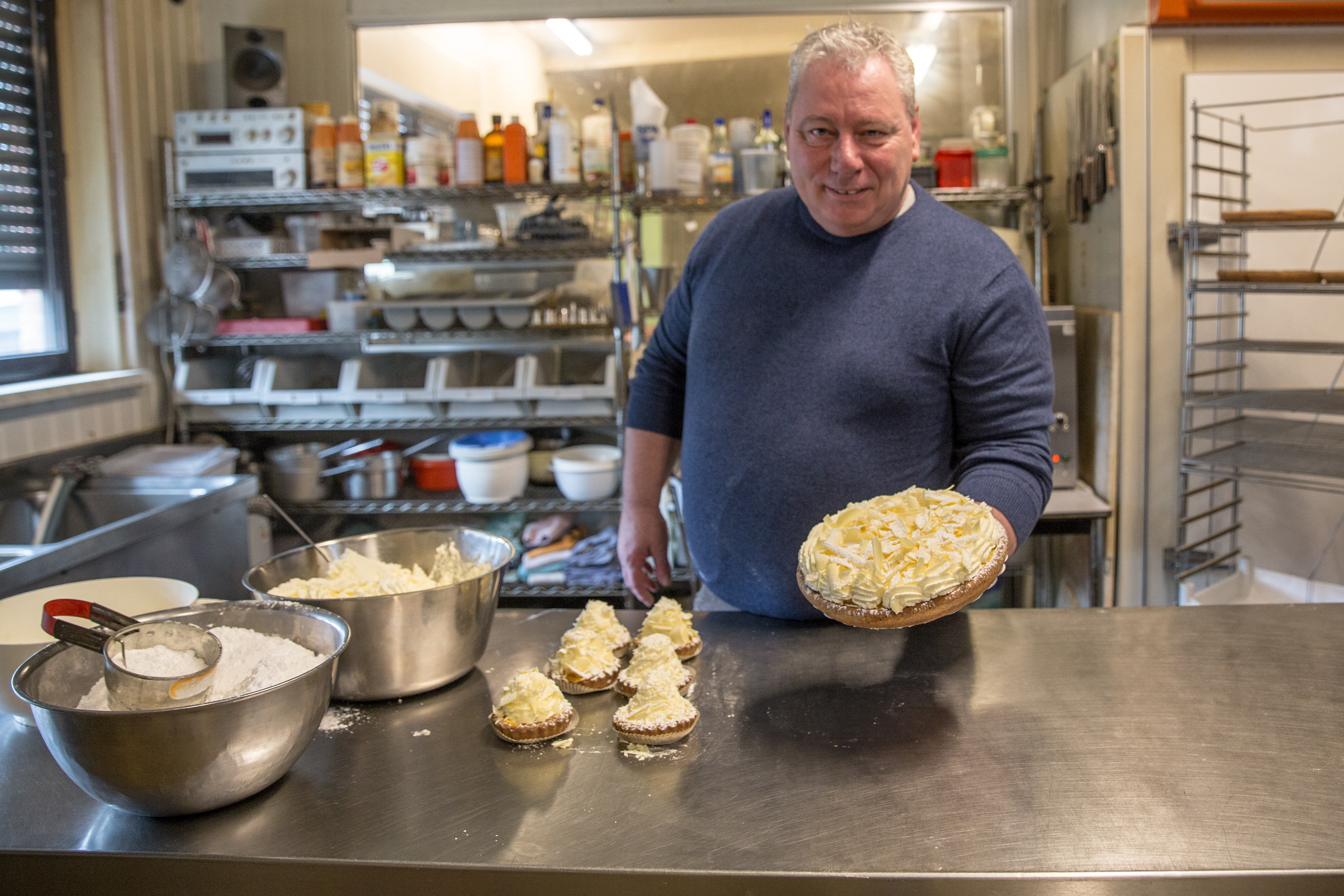 Bakker Danny Swinnen poseert met een smurfentaart, een uitvinding van zijn vader Lucien.